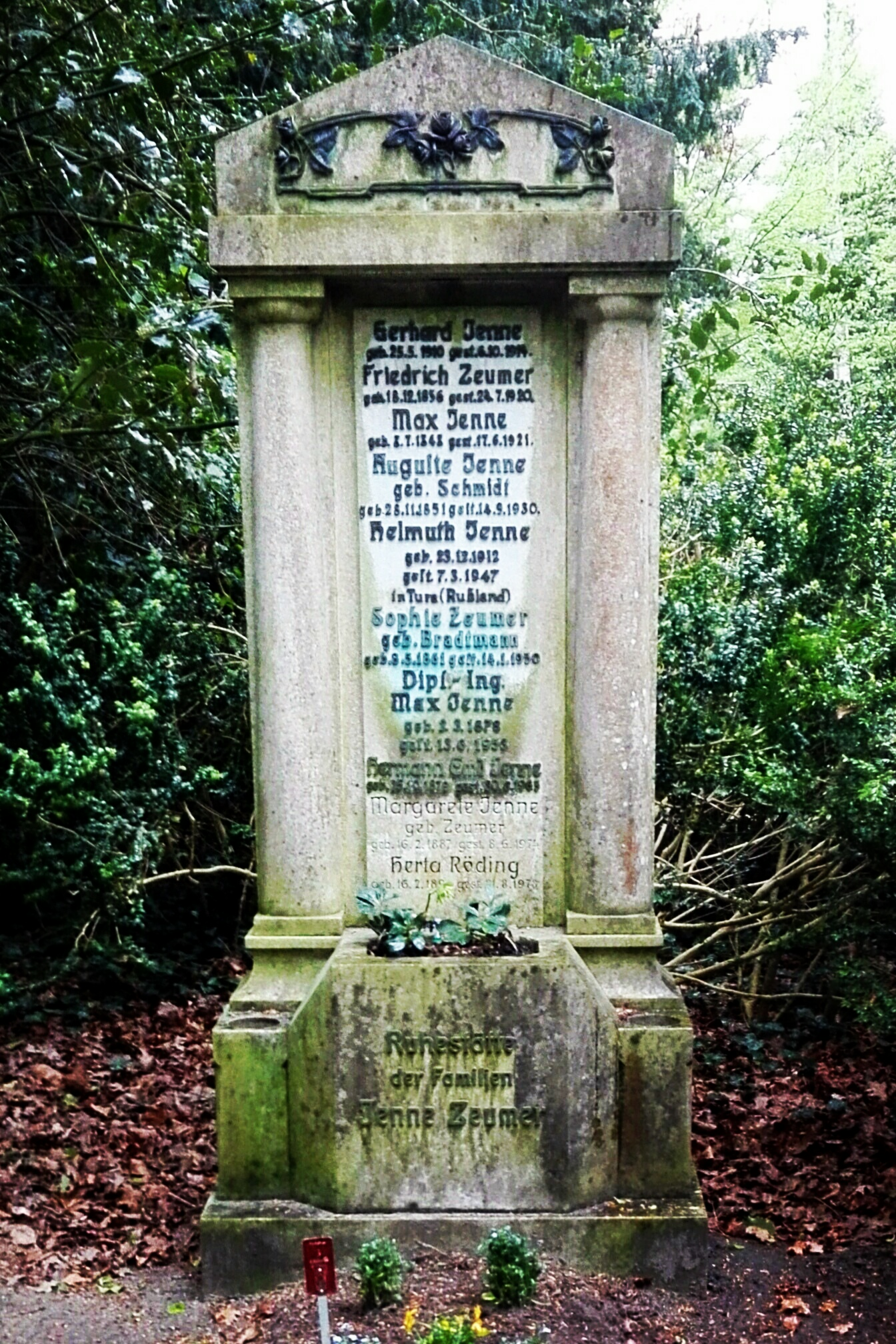 Jennesches Familiengrab auf dem Burgtorfriedhof.